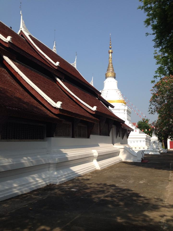 วัดสุชาดาราม อ.เมืองลำปาง